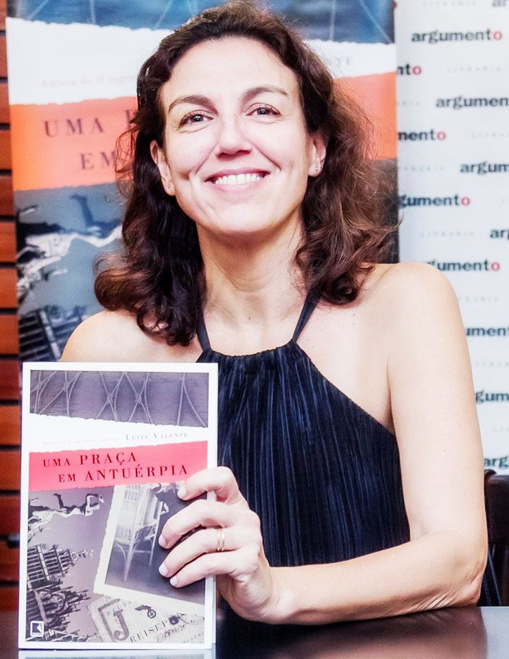 Luize Valente no lançamento de seu segundo romance histórico, "Uma praça em Antuérpia" (Record, 2015).